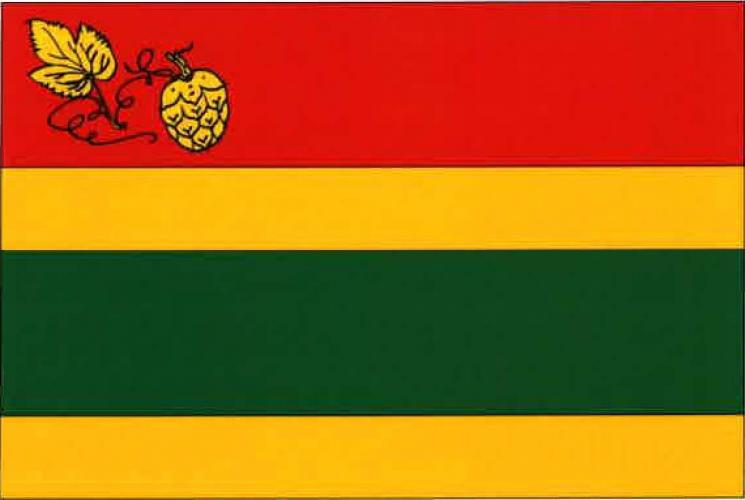 vlajka,Domoušice , okres Louny